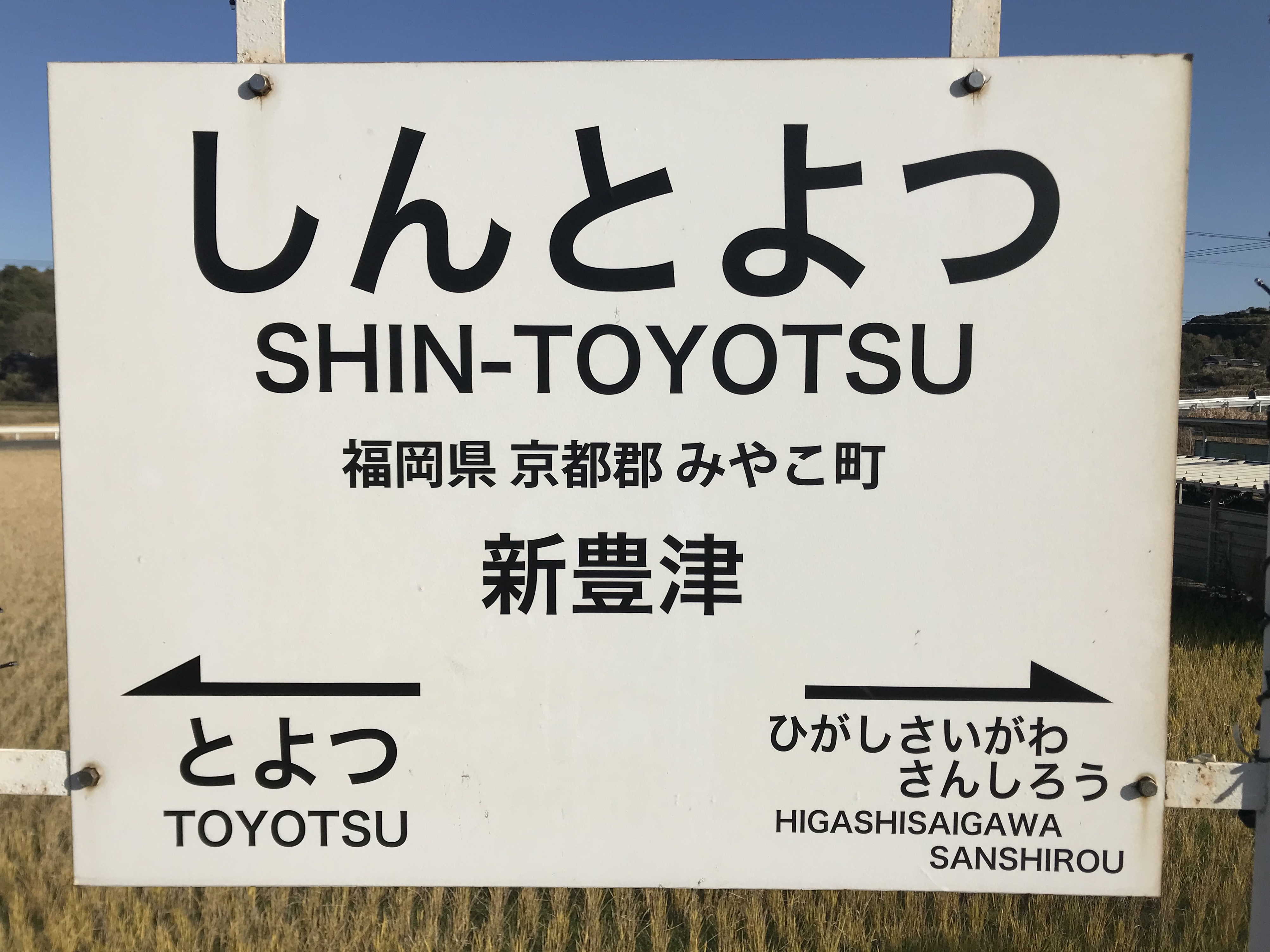 新豊津駅の駅名標